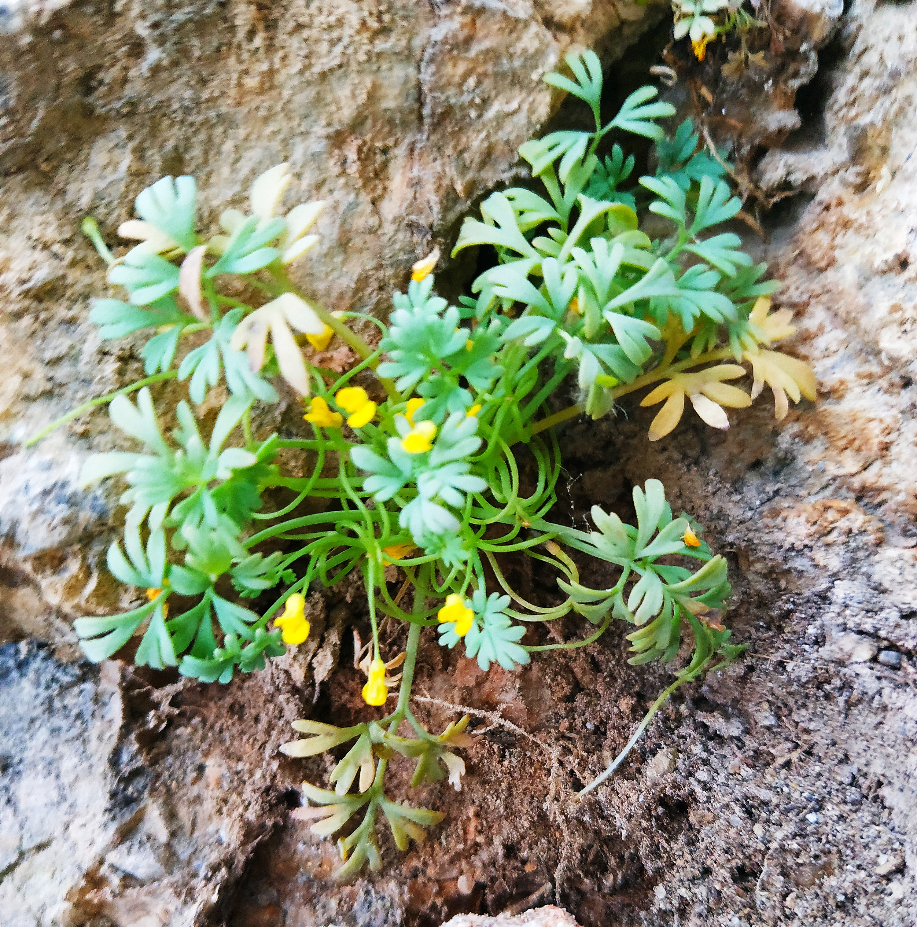 Oʻzbekcha/ўзбекча: Turkiston-shotarachasi-Fargona vodiysining endemik turi